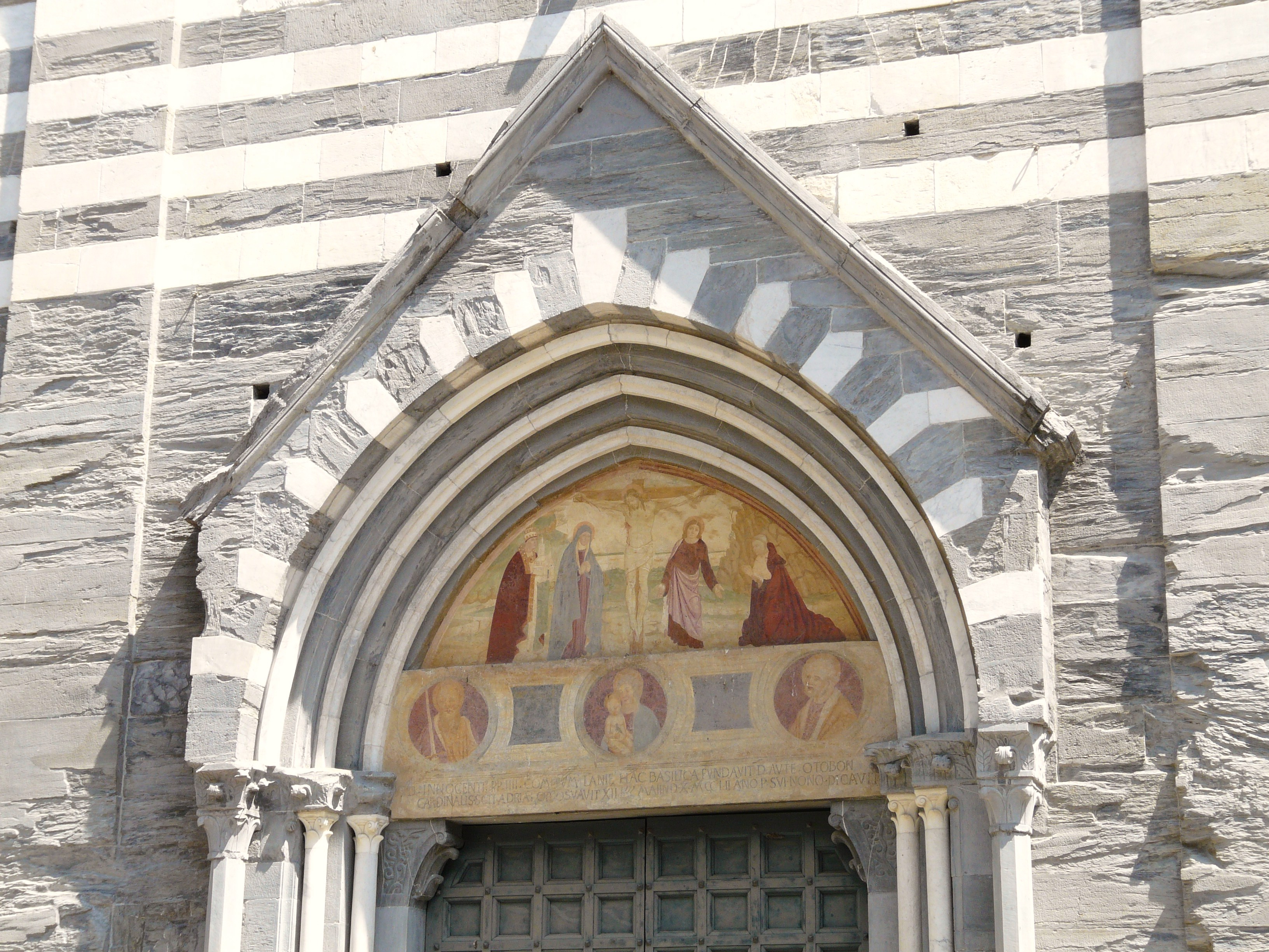 Interni ed esterni della basilica dei Fieschi presso il borgo di San Salvatore di Cogorno, Liguria, Italia Portale della basilica dei Fieschi presso il borgo di San Salvatore di Cogorno, Liguria, Italia